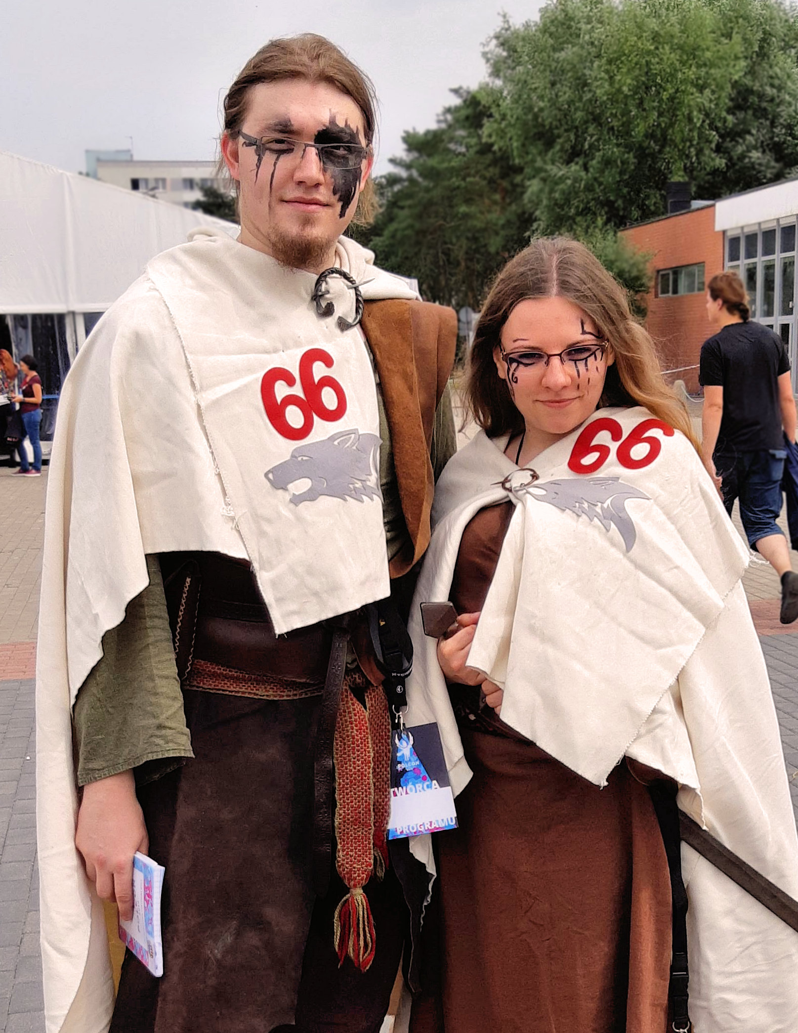 Opowieści z meekhańskiego pogranicza (Meekhan), Polcon 2018 w Toruniu